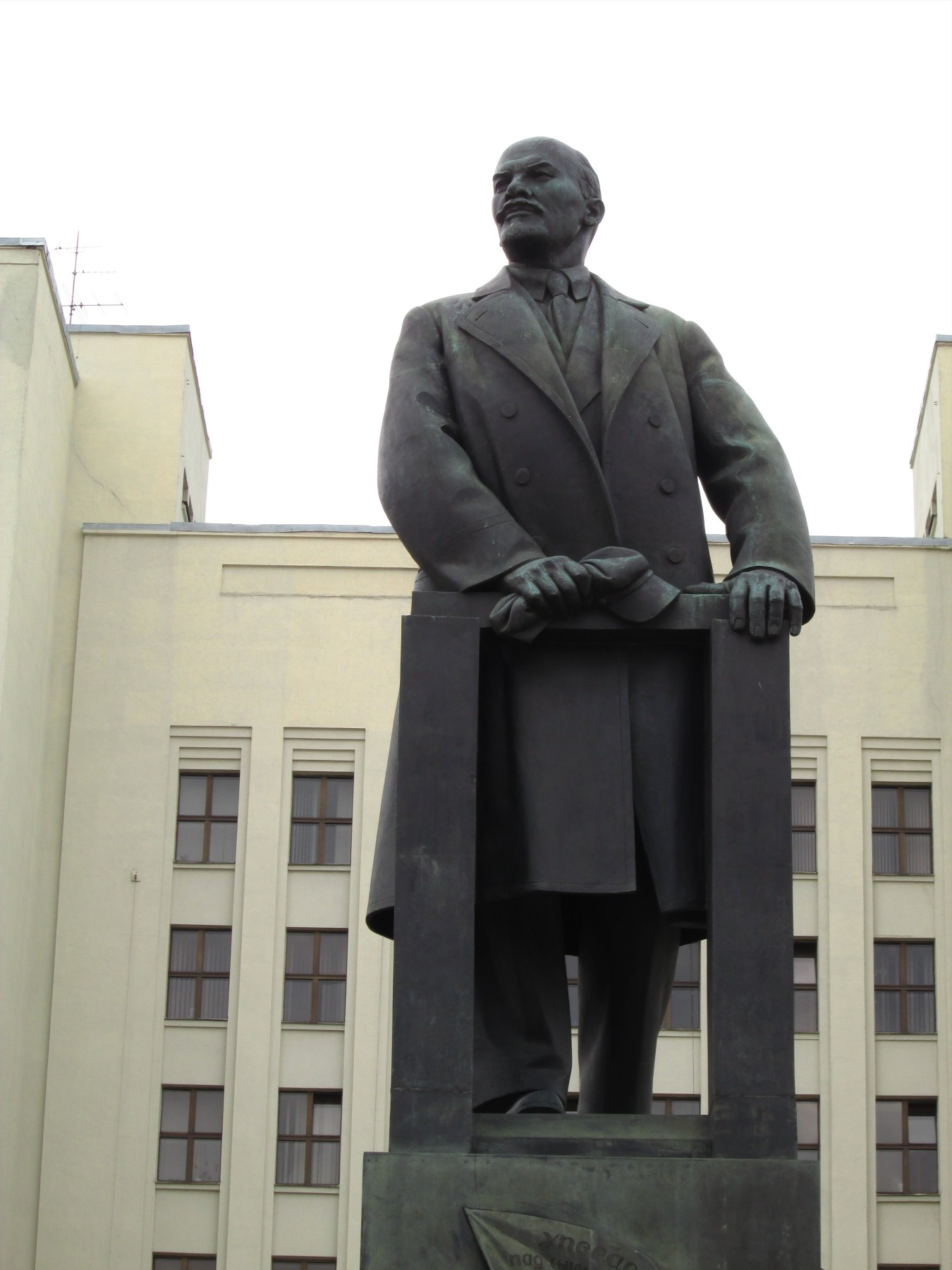 Maskoŭski Rajon, Minsk, Belarus